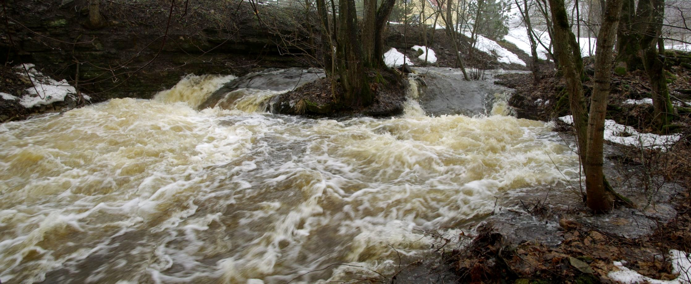 Joastik asub Harkujärve külas Harkuojal